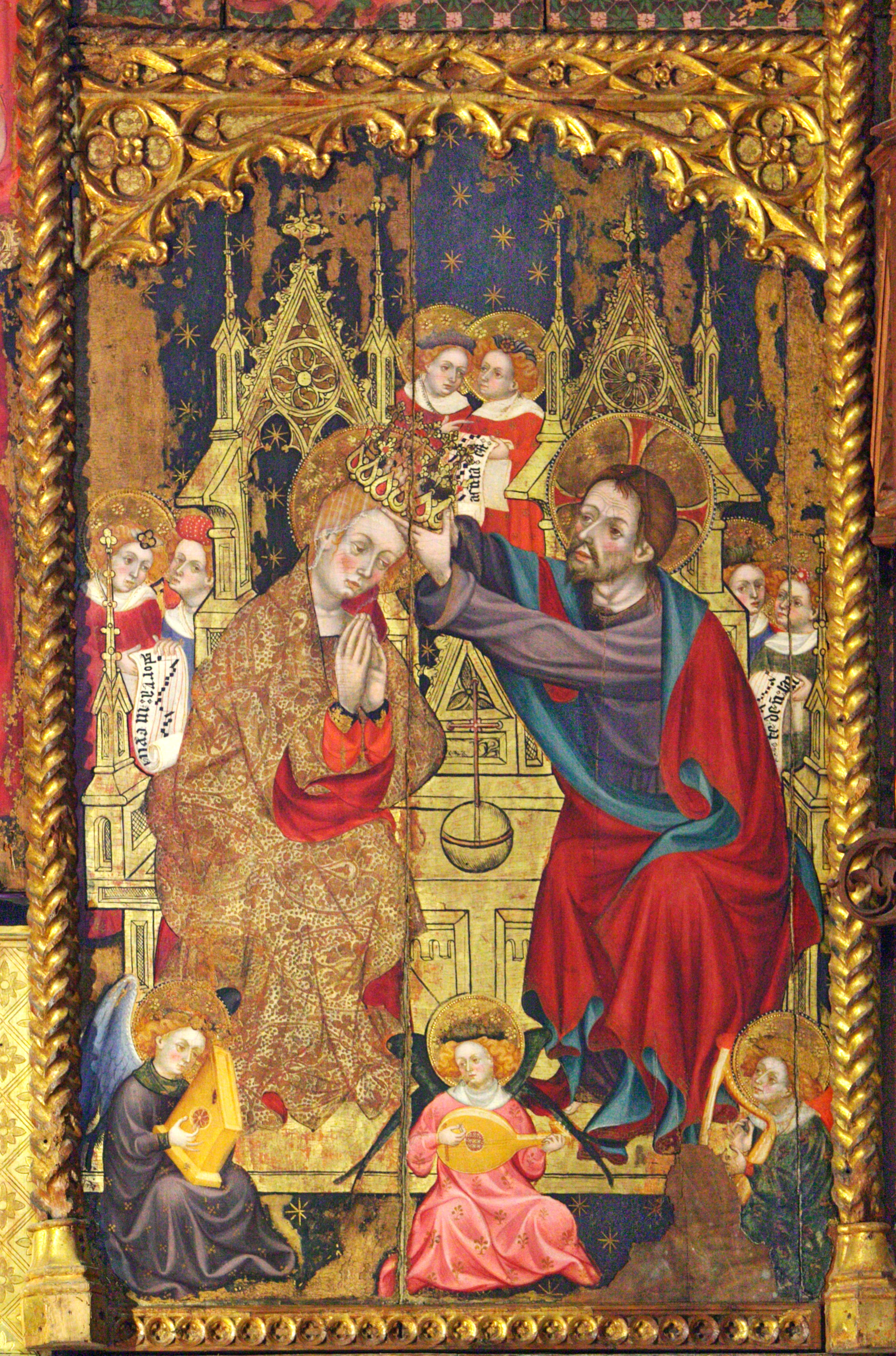 Taula de la Coronació de la Mare de Déu de l'antic retaule gòtic del Monestir de Santes Creus. Actualment està muntat sobre una nova estructura formant un retaule més petit a la catedral de Tarragona